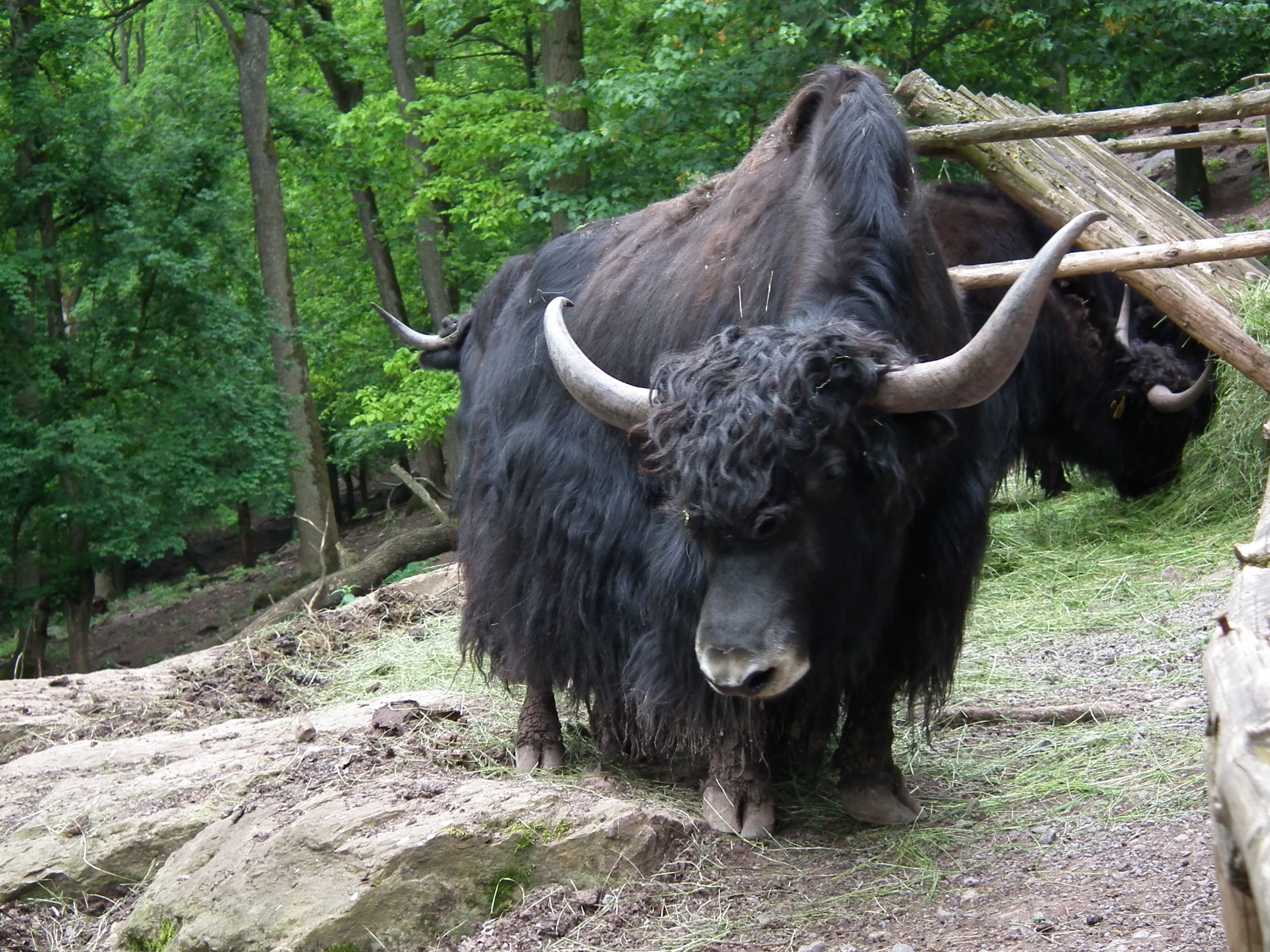 Yak-Bulle (Bos mutus), fotografiert im Wildpark Tripsdrill (Baden-Württemberg, Deutschland)